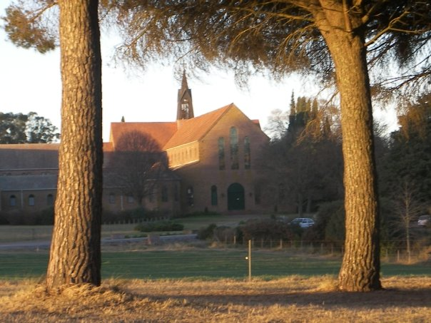 Monasterio Trapense